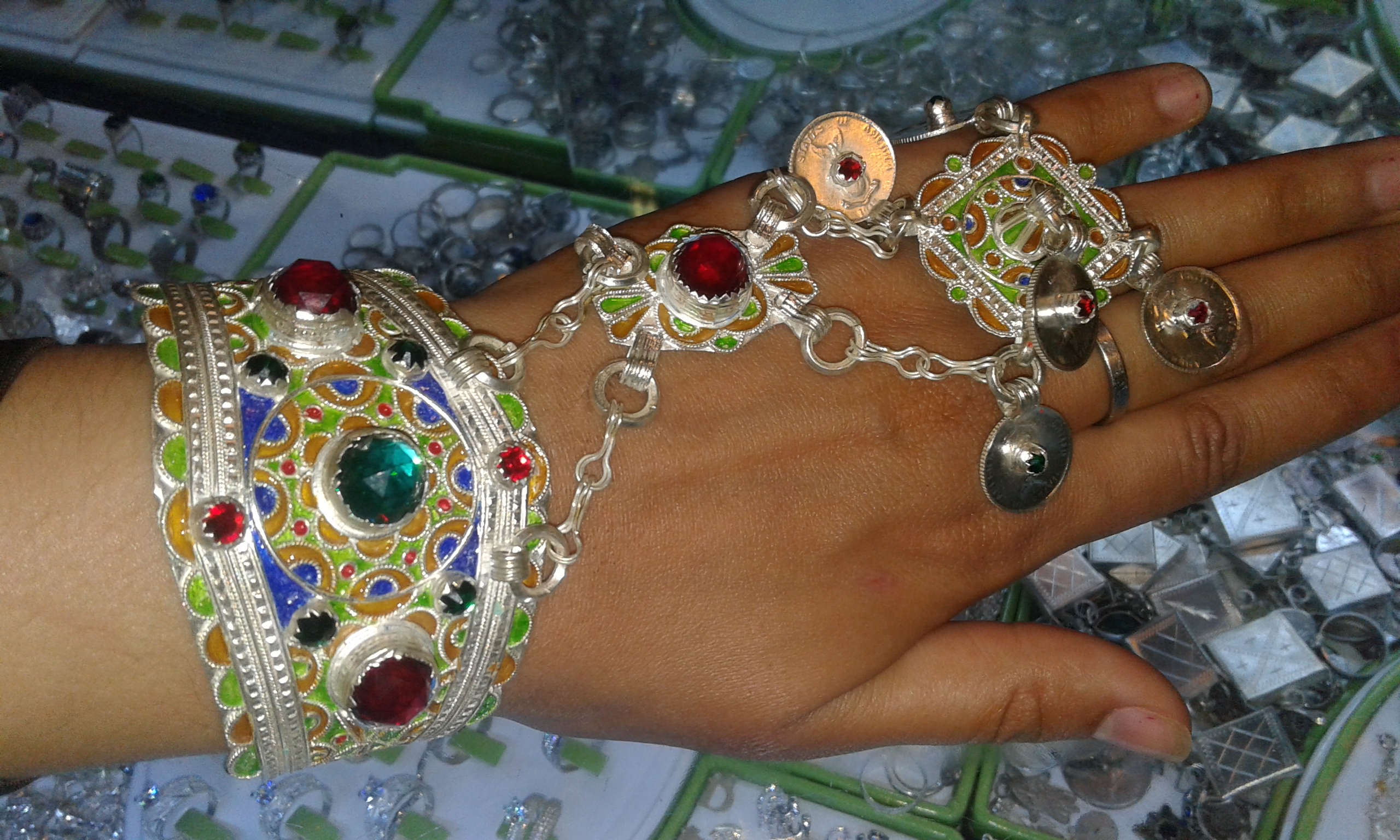 مجوهرات مغربية لوبان أساول فضة زينة ذهب من تصوير سعيد الجمالي